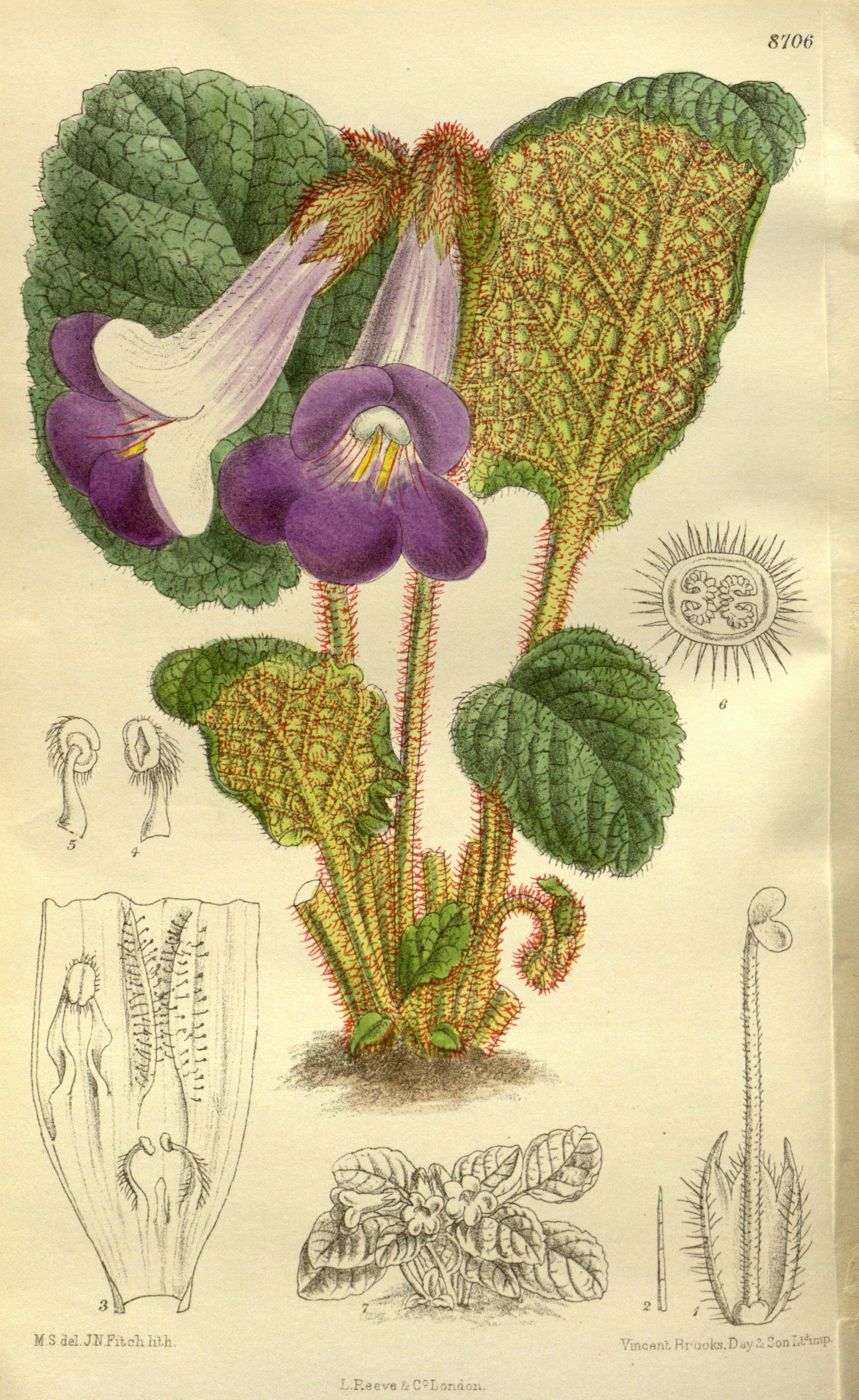 Chirita trailliana (= Chirita speciosa), Gesneriaceae